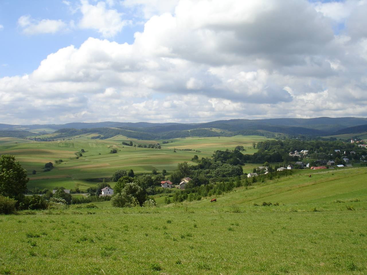 Pogórze Bukowskie, Wola Sękowa